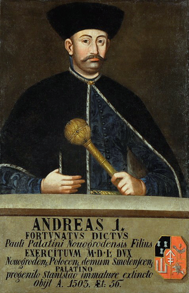 Беларуская (тарашкевіца): Партрэт Андрэя Сапегі (Andrej Sapieha) гербу «Ліс» (каля 1560 — 1621), дзяржаўнага і вайсковага дзеяча Вялікага Княства Літоўскага, падчашага вялікага, кашталяна менскага, ваяводы полацкага і смаленскага.